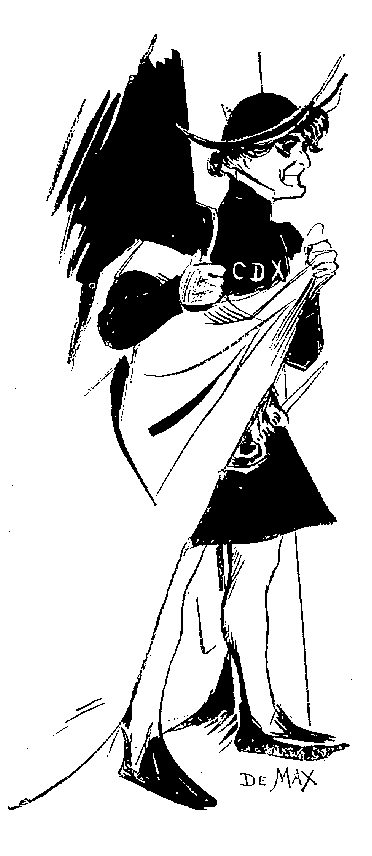 Edouard de Max dans le rôle d'Homodei dans la pièce de théâtre de Victor Hugo "Angelo tyran de Padoue"